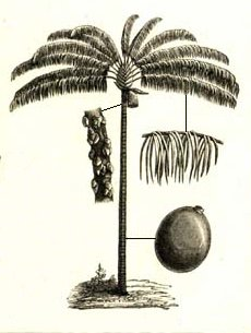 Oenocarpus distichus